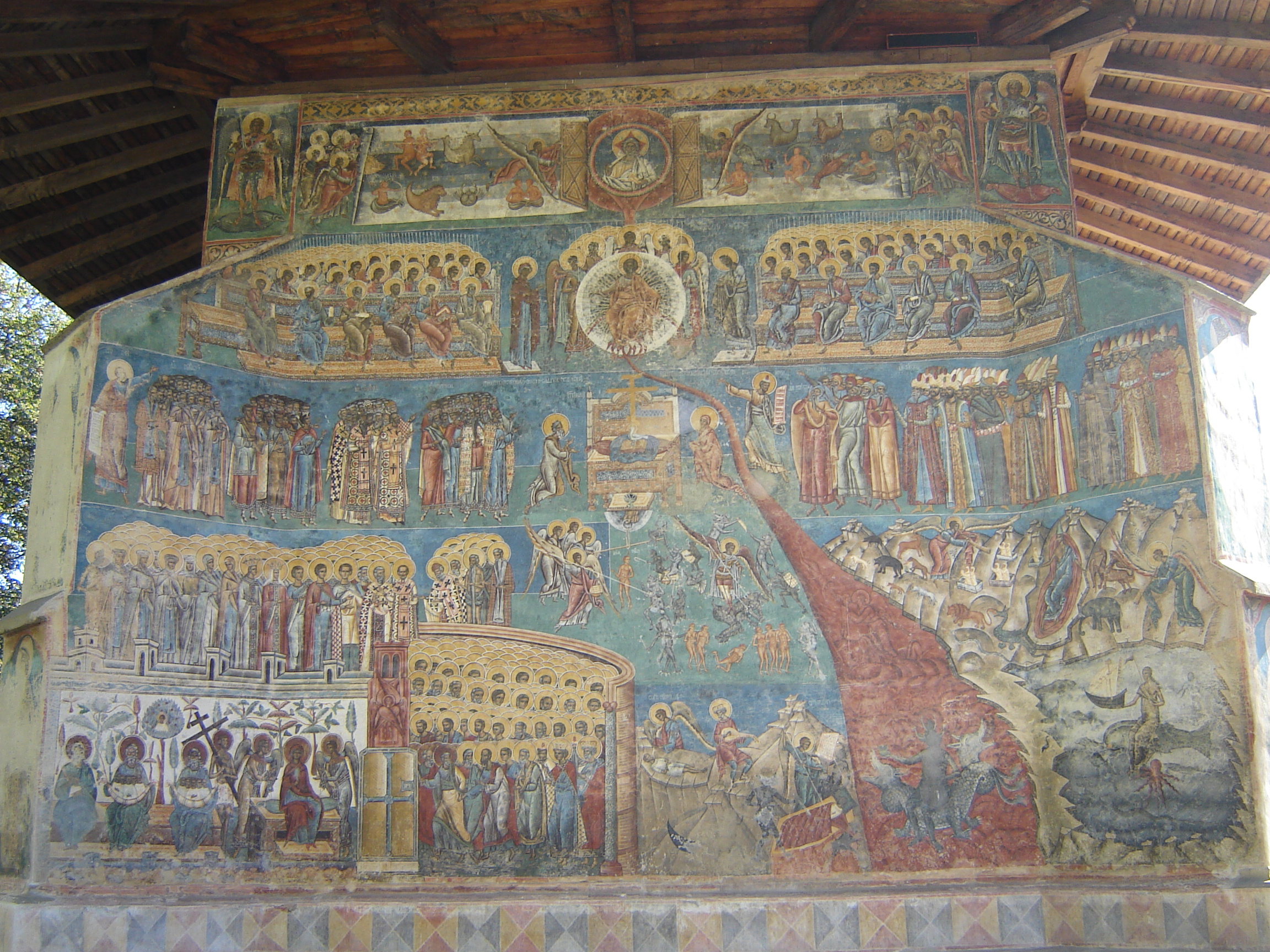 Judecata de apoi, Voronet